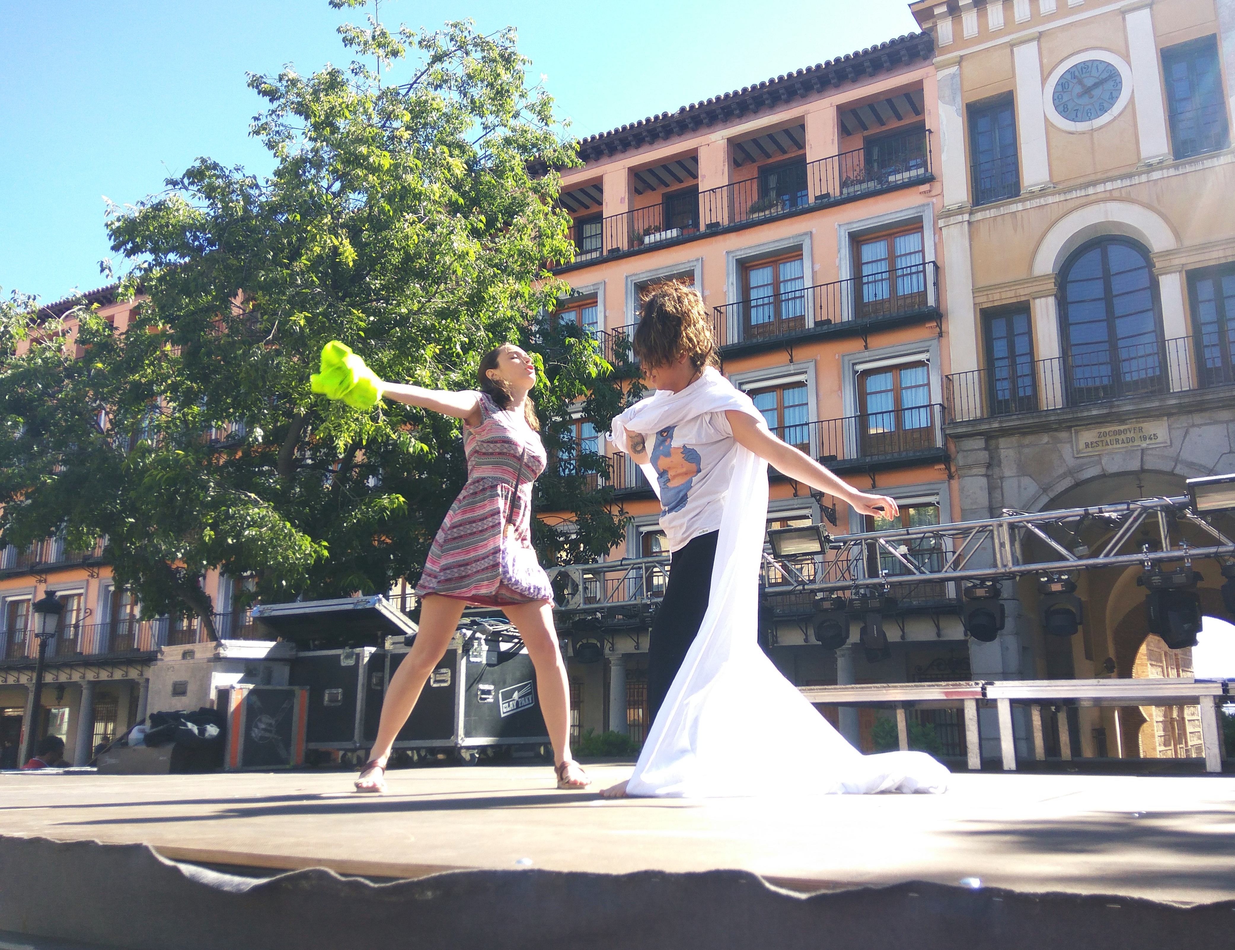 La playa blanca, de Alberto Rizzo, cía. TECU Teatro (UR), en el marco del IV Festival Nacional de Teatro Universitario en la plaza Zocodover de Toledo, 2019.